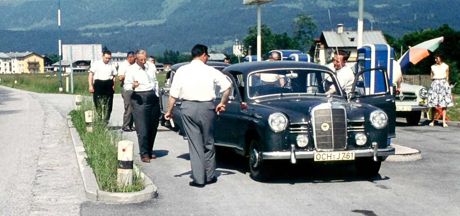 Mercedes-Benz W120 mit deutschem Kennzeichen (OCH für Ochsenfurt) an einer Tankstelle in Kirchdorf in Tirol